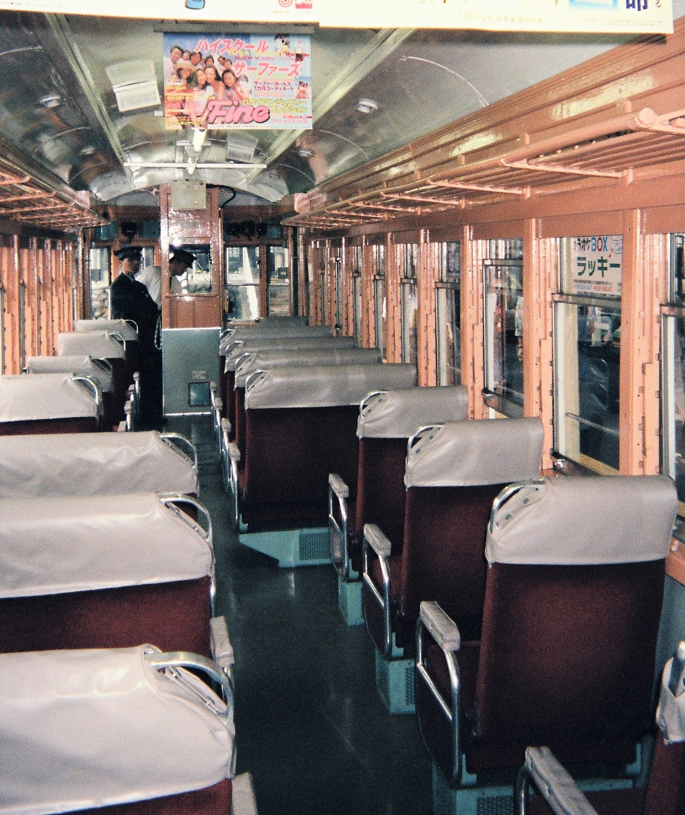 名鉄谷汲線モ514の車内（1998年5月撮影）